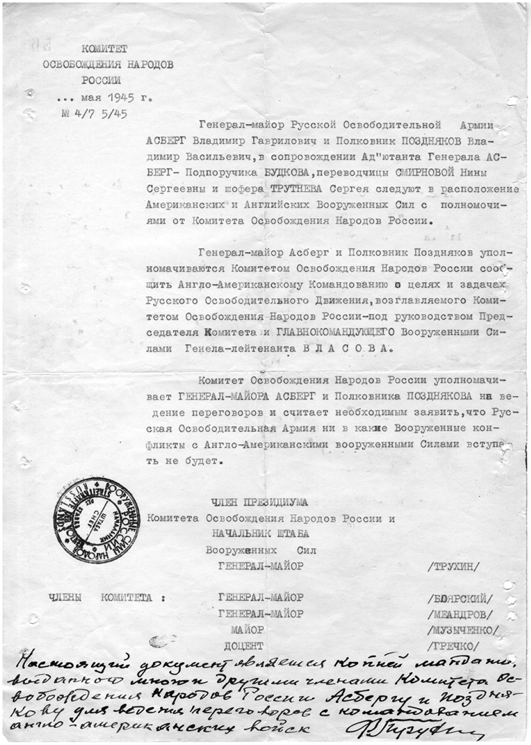 Мандат, выданный Ф. И. Трухиным и другими членами КОНР, полномочным представителям КОНР генерал-майору В. Г. Ассбергу и полковнику В. В. Позднякову, направленным в расположение американских и английских вооруженных сил. 4 мая 1945 г. ЦА ФСБ России. № Н–18766. Т. 8. Л. 56.